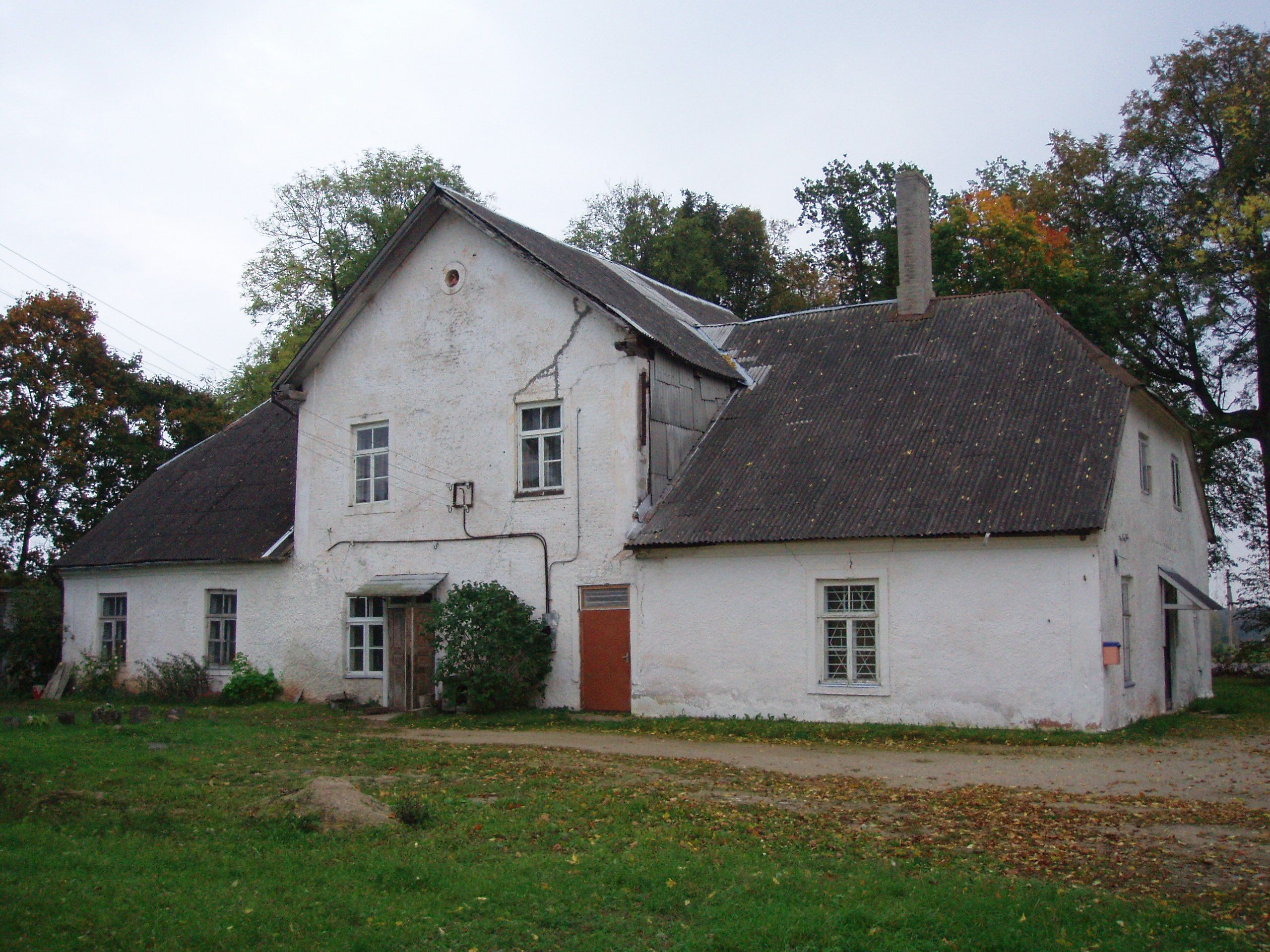 Väike-Konguta mõisa peahoone 2006. aastal.